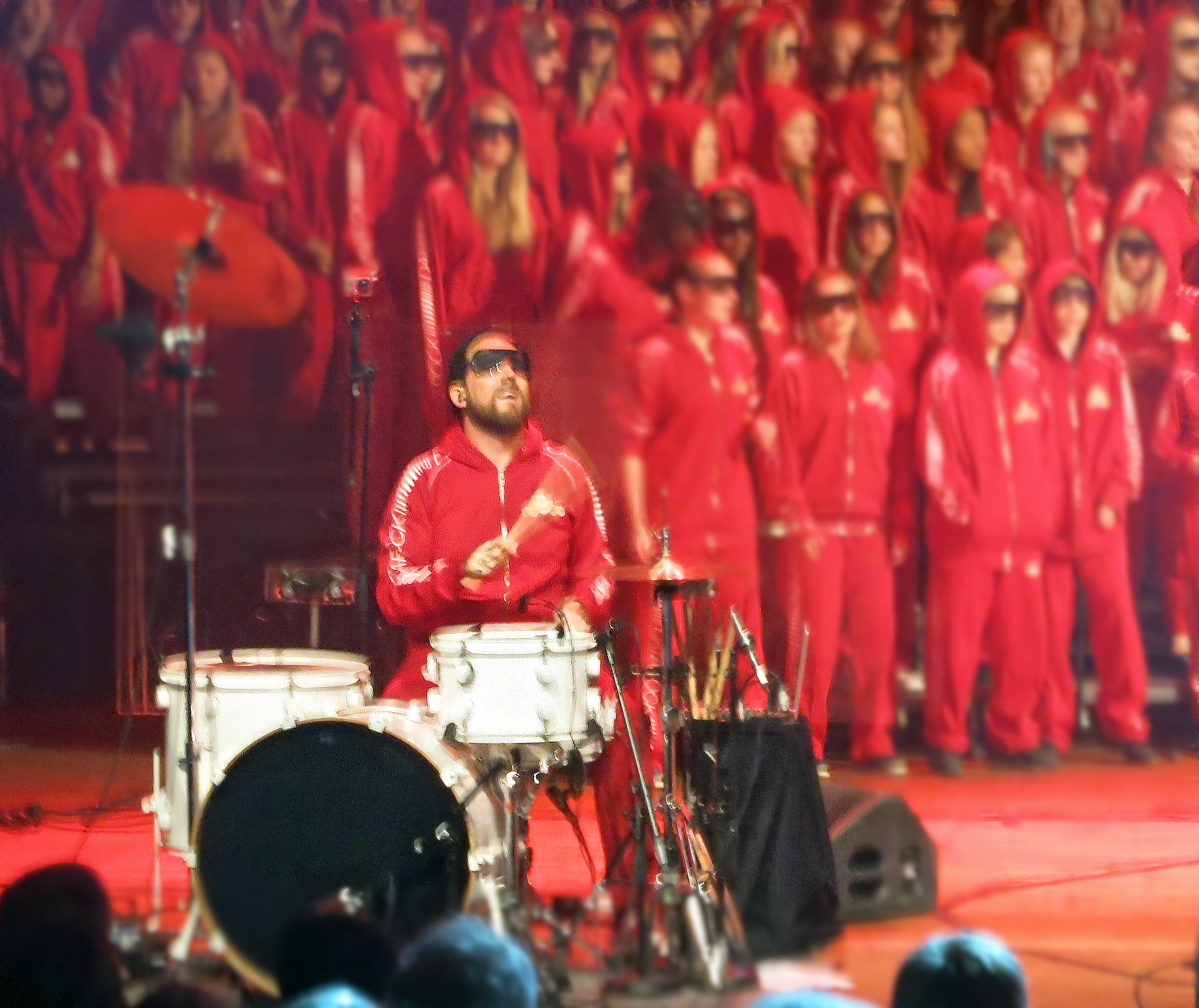 Datarock